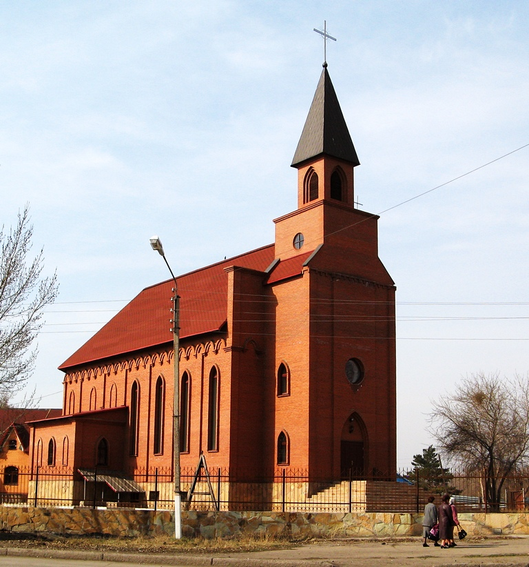 Католический храм